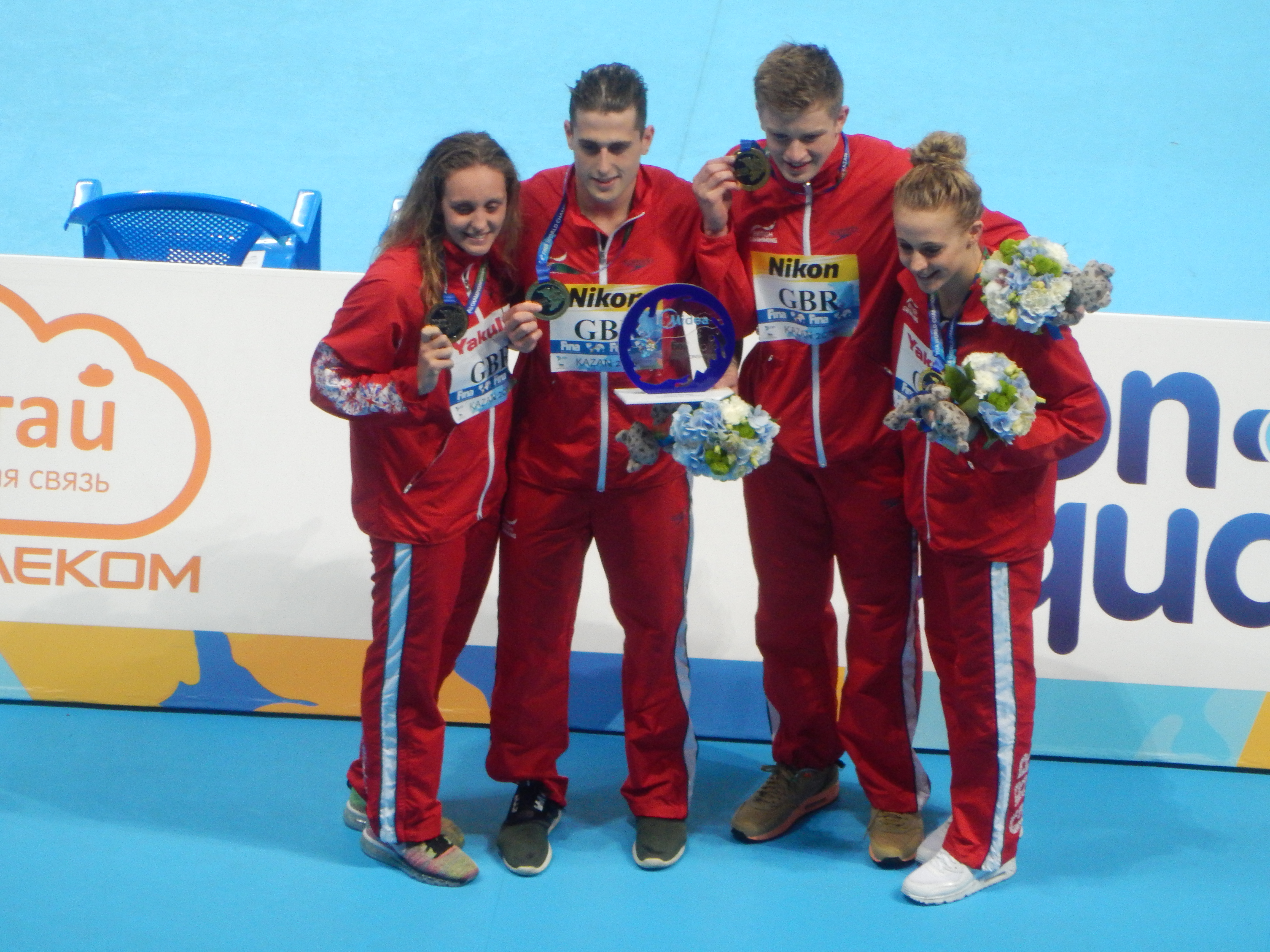 Великобритания берёт золото с мировым рекордом в смешанной комбинированной эстафете